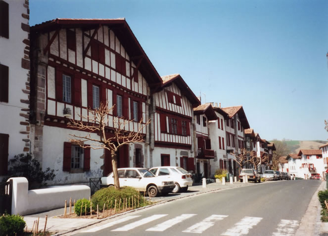 Vue de la rue principale d'Ascain Pyrénées).